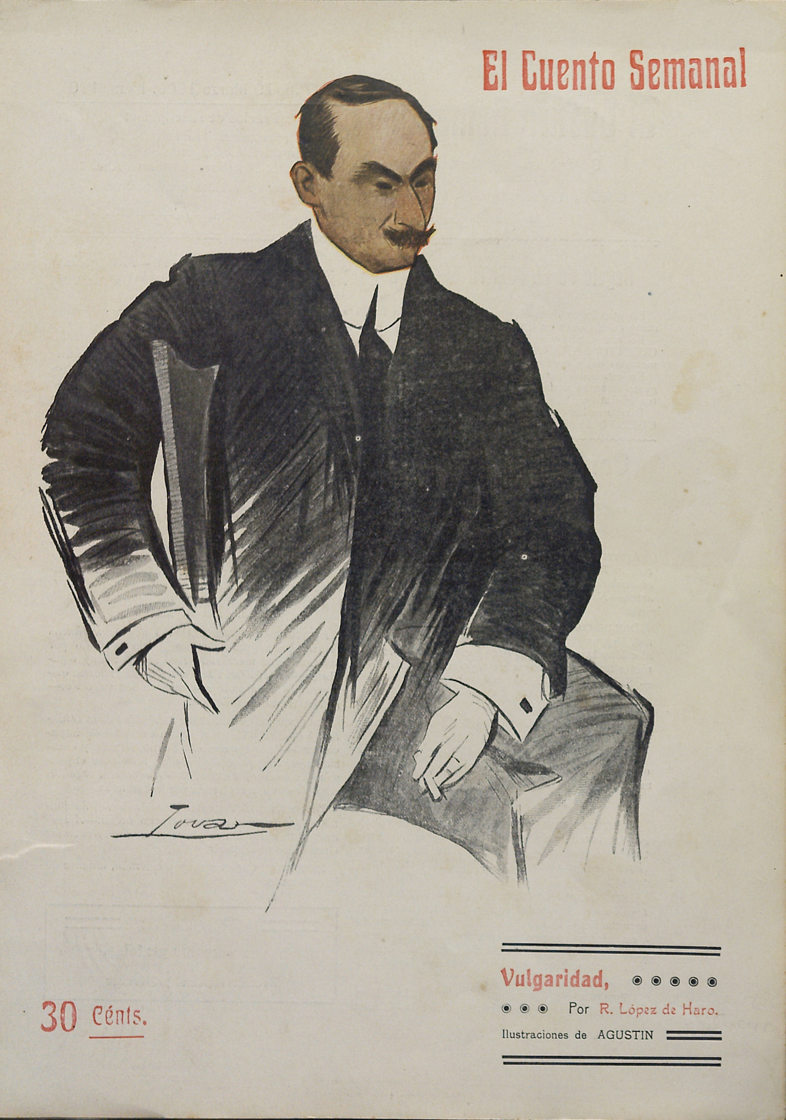 Vulgaridad, de Rafael López de Haro.